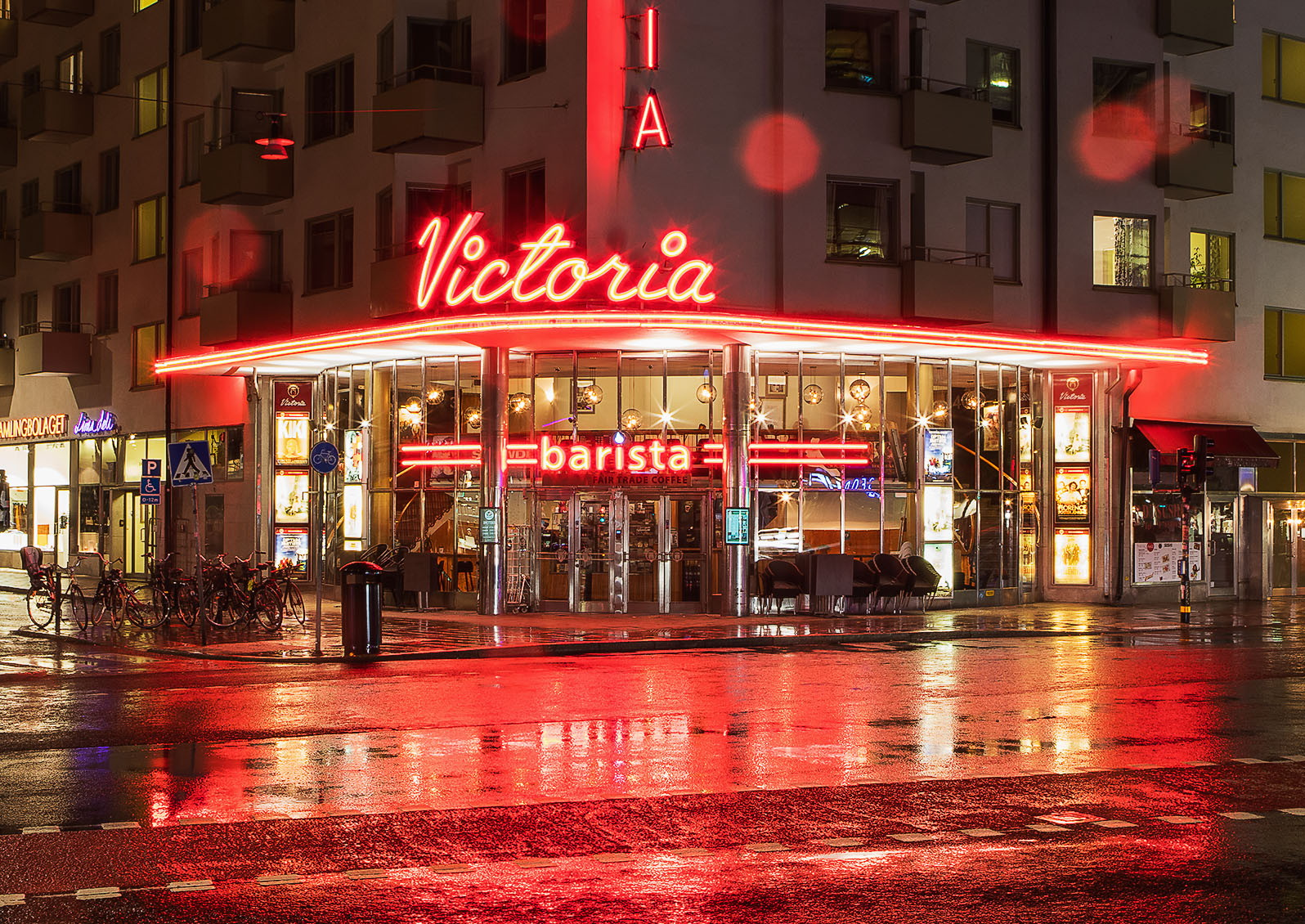 Biografen Victorias entré